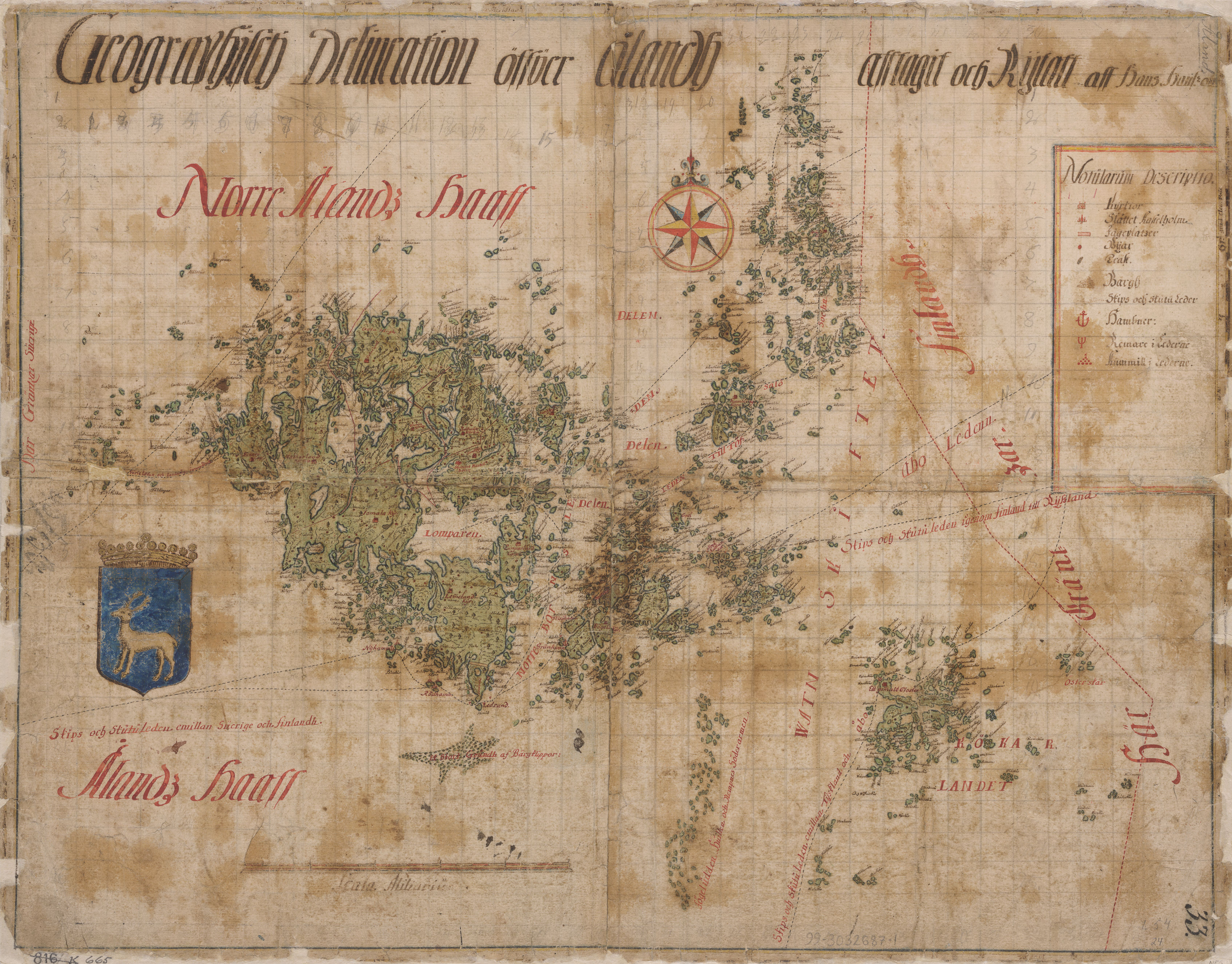 Karta över Åland med omgivande hav ("Geographisch delineation öffver Ålandh"). Skannad av Kungliga Biblioteket.